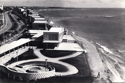 3 villas présidentielles à Eforie Nord